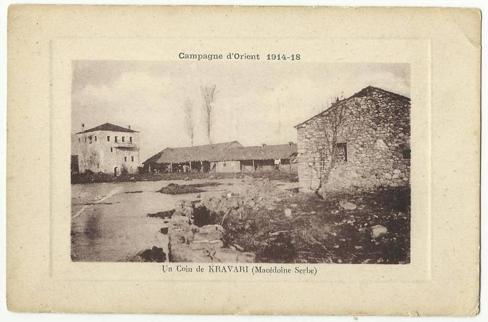 Кравари през Първата световна война.